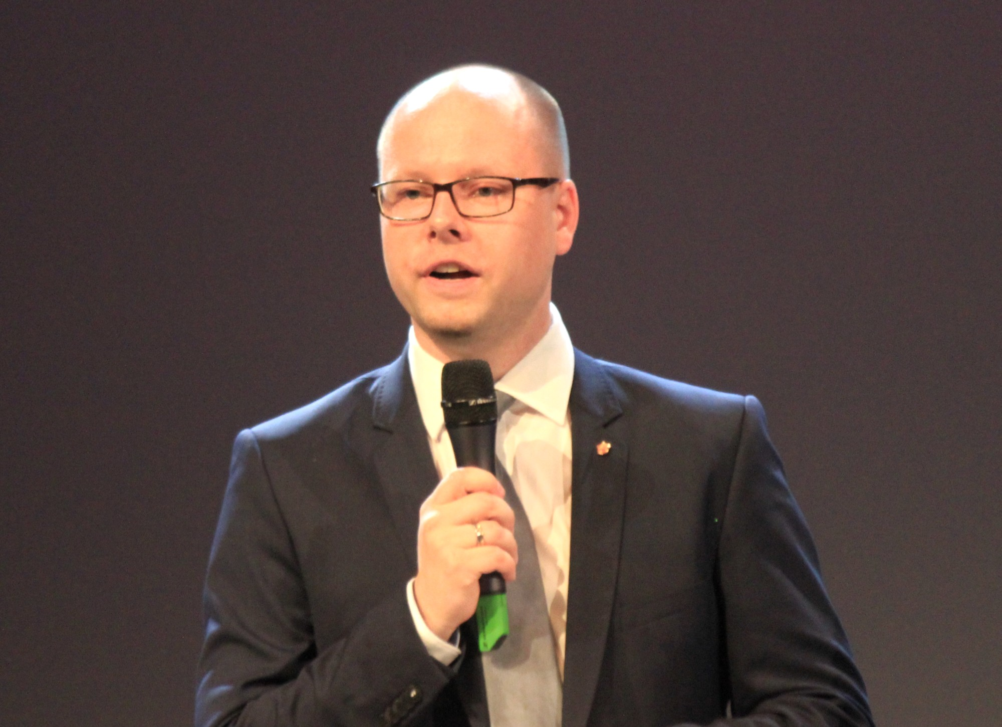 Hornjoserbsce: Předsyda Domowiny Dawid Statnik na zahajenju Mjezynarodneho folklorneho festiwala "Łužica" 2017.